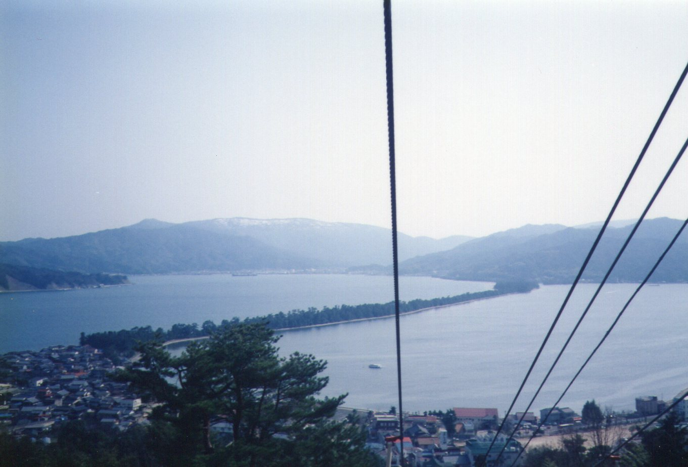 天橋立リフトより